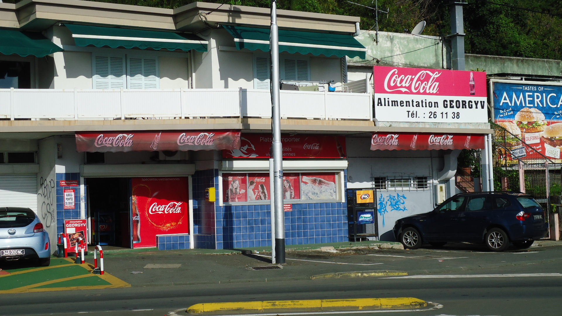 Magasin asiatique typique de Nouméa